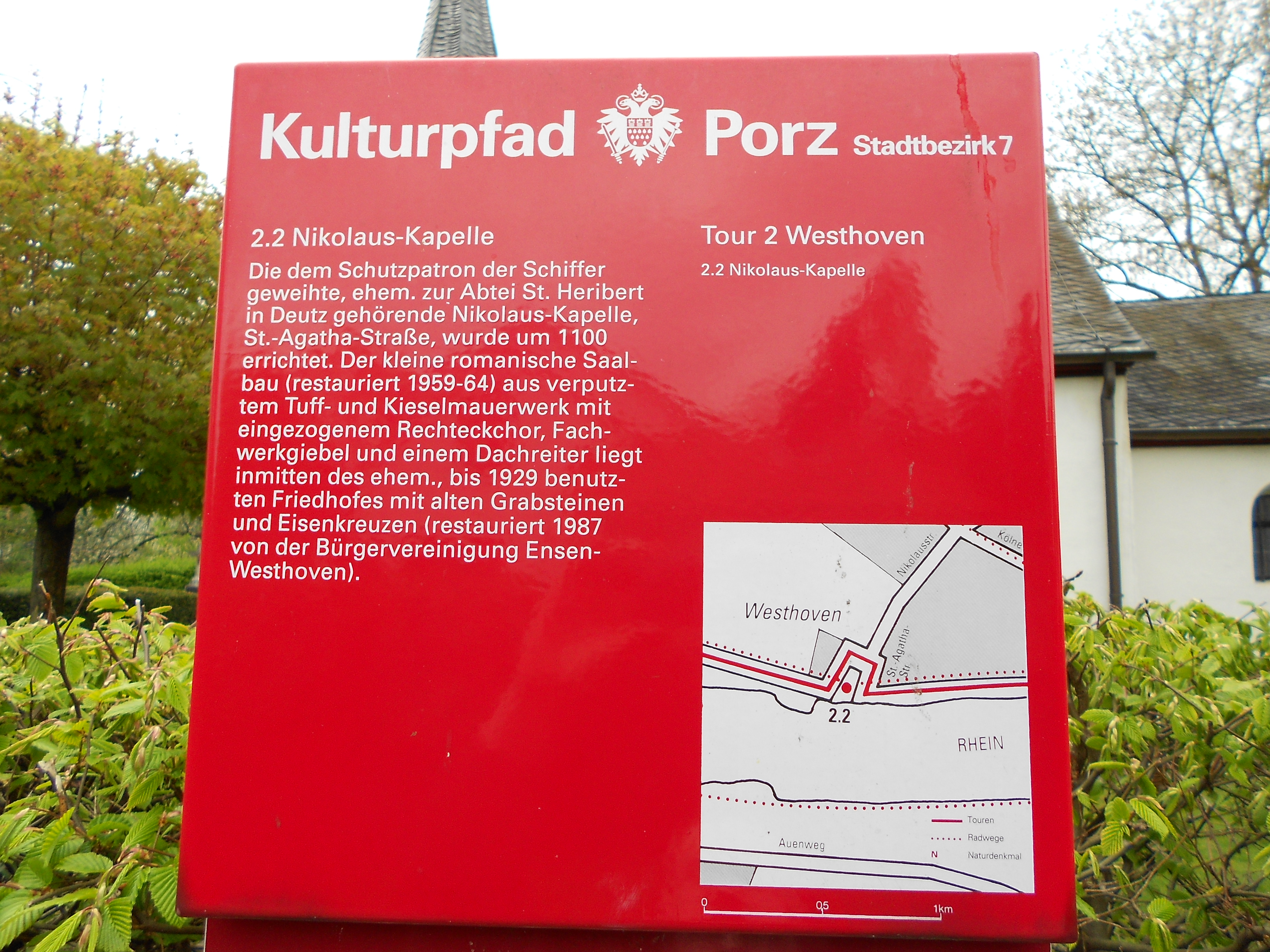 Das Foto zeigt die Infotafel des Kulturpfad Porz zur Nikolaus-Kapelle in Köln-Westhoven